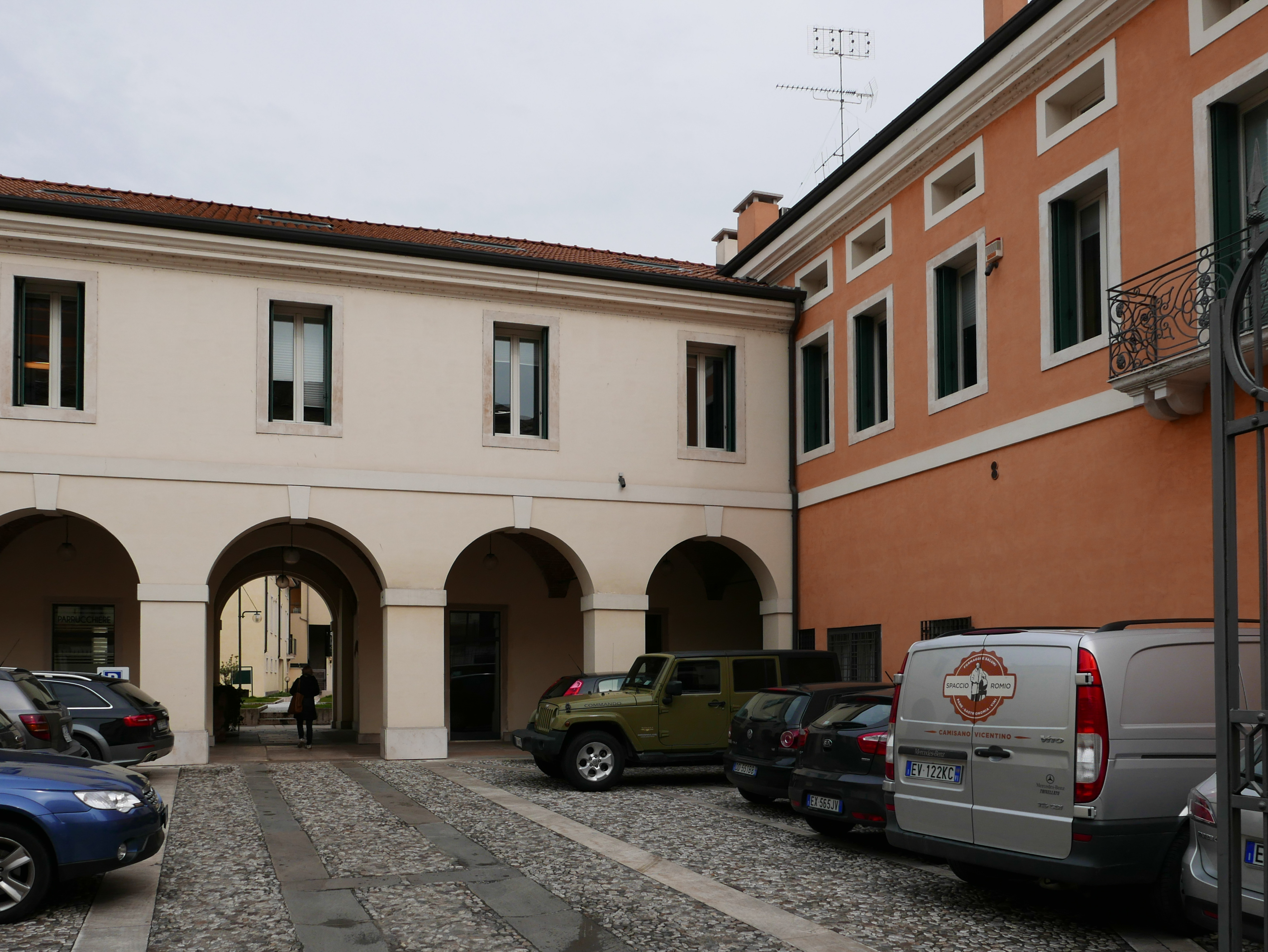 Dettaglio della facciata